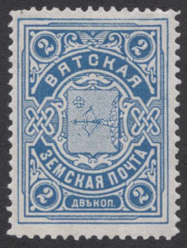 Земская марка Вятский уезд № 2 (1912 г.)